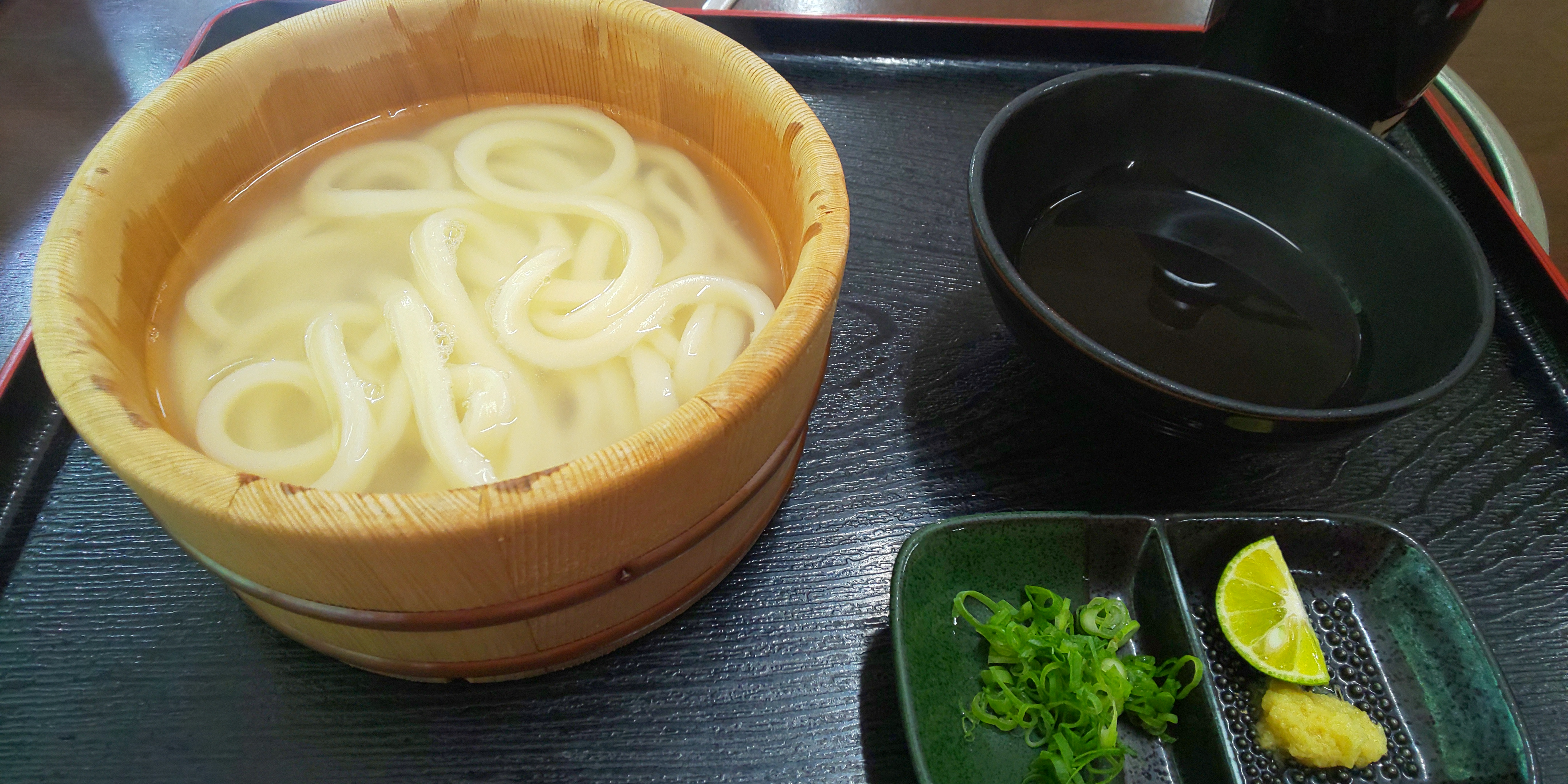 たらいうどん 徳島県三好市土成町 樽平にて